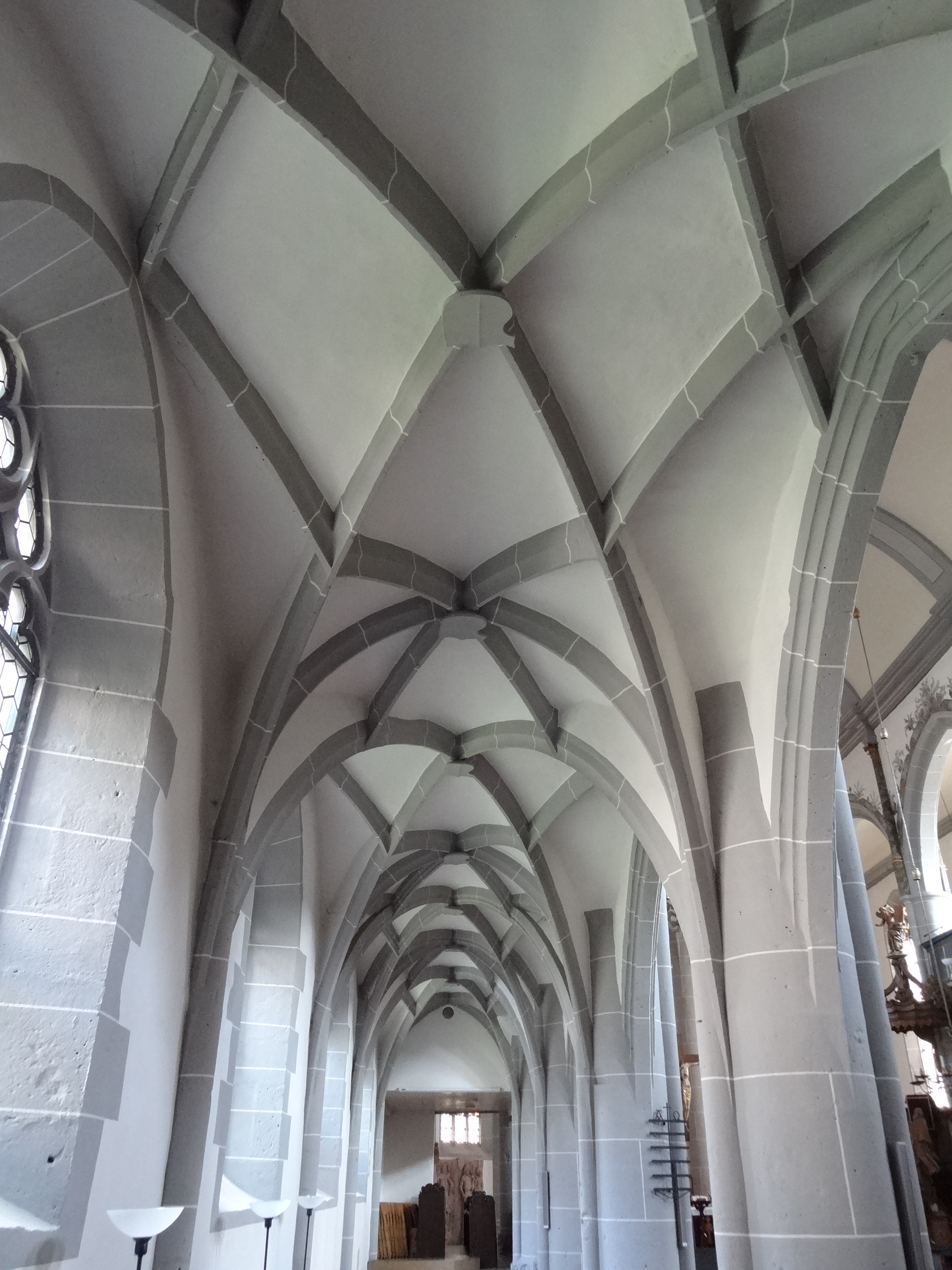 Marienstiftskirche Lich